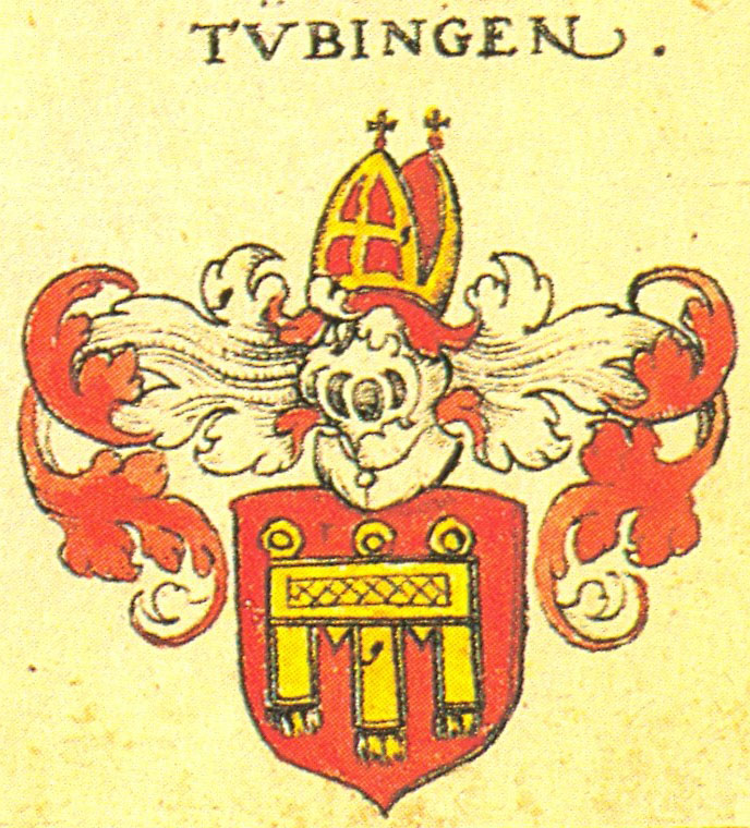 Johann Siebmacher: New Wappenbuch Grafen Tübingen